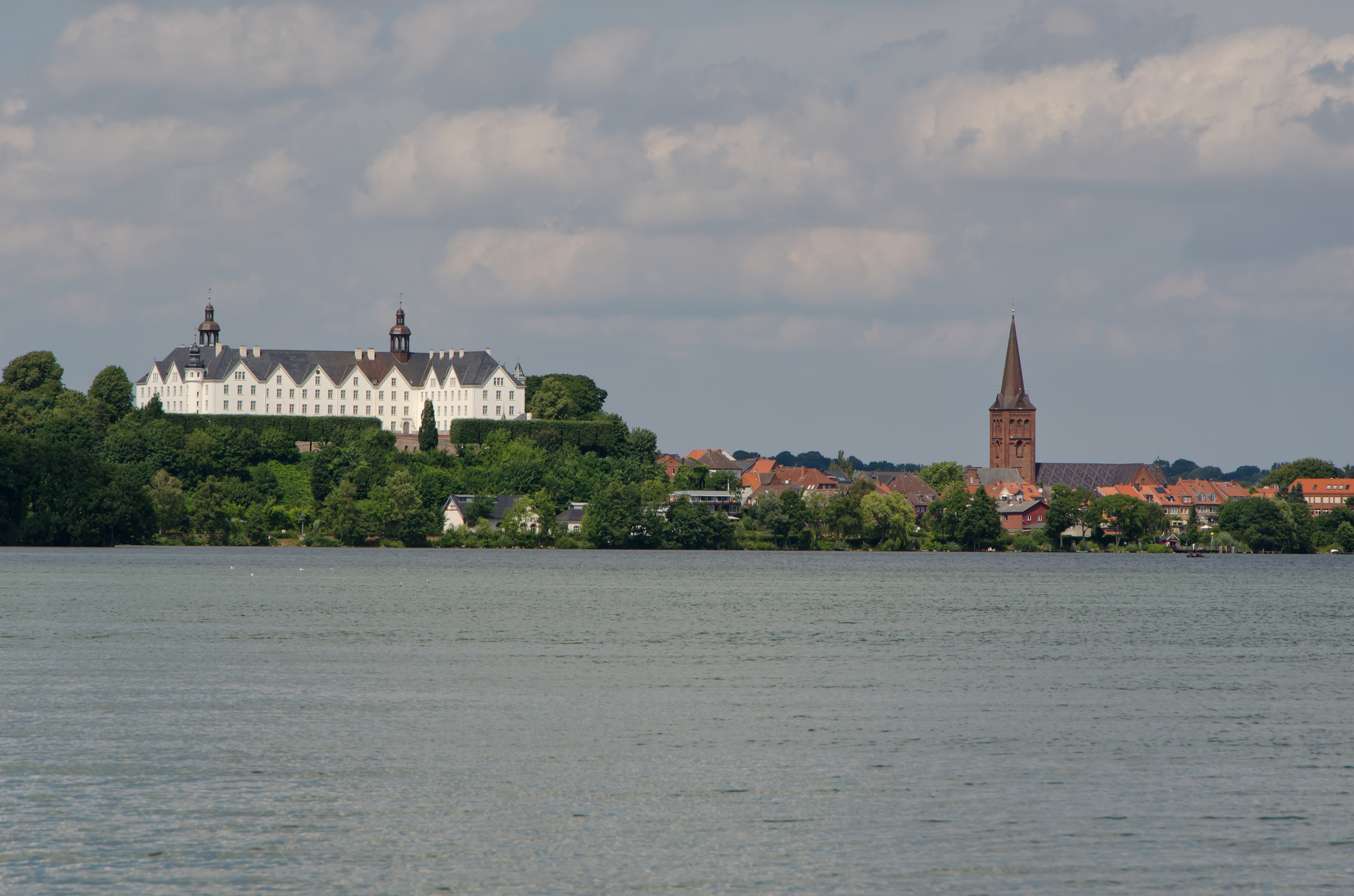 Plöner Schloss und St. Nikolai